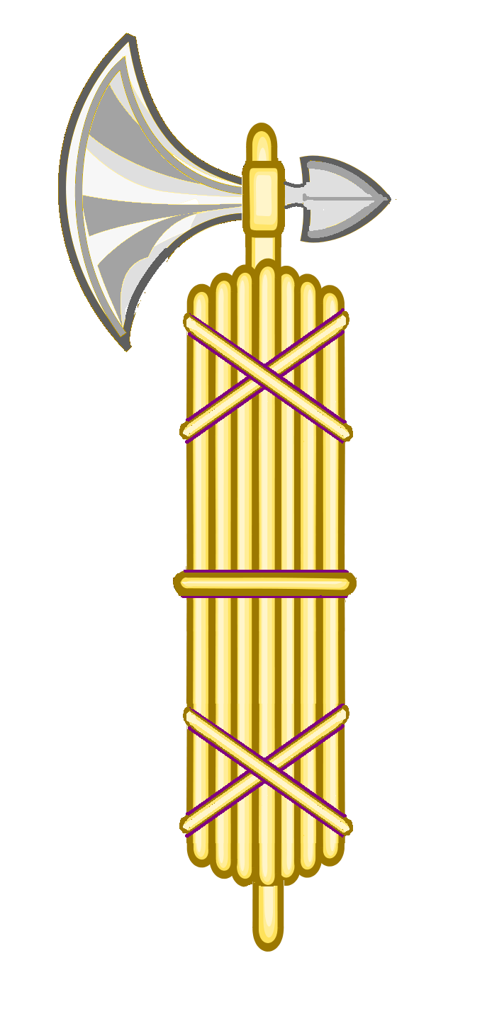 Distintivo del Cuerpo Jurídico de la Armada (Haz de lictores)